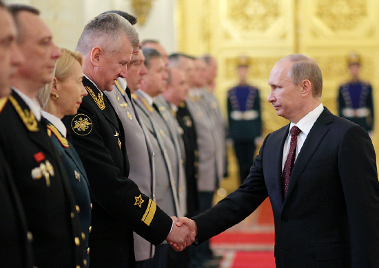 Николай Евменов с Президентом России Владимиром Путиным на церемонии представления высших офицеров по случаю их назначения на вышестоящие должности и присвоения им высших воинских званий